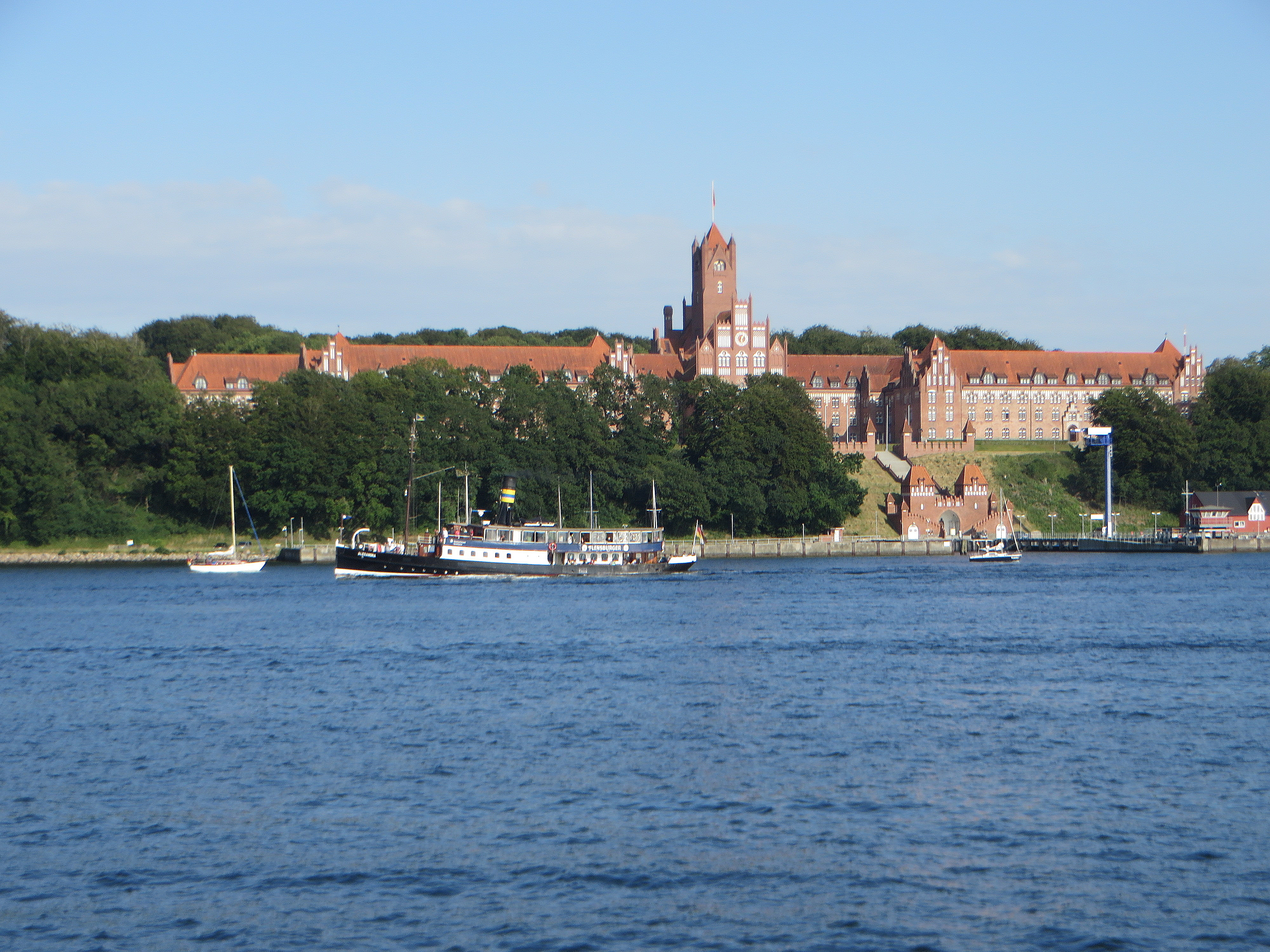 Alexandra vor dem Roten Schloss (Flensburg-Mürwik 2015), Bild 06; Bild entstand während des Dampf Rundums 2015